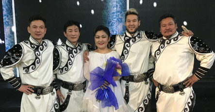 Монгол: Бөртэ хамтлаг - Өвөл шоу 2017